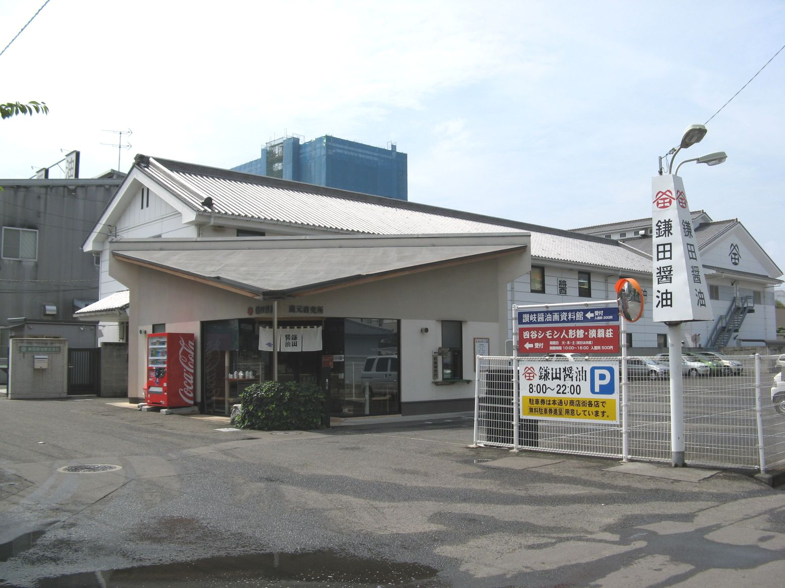 鎌田醤油本社・蔵元直売所・本社工場